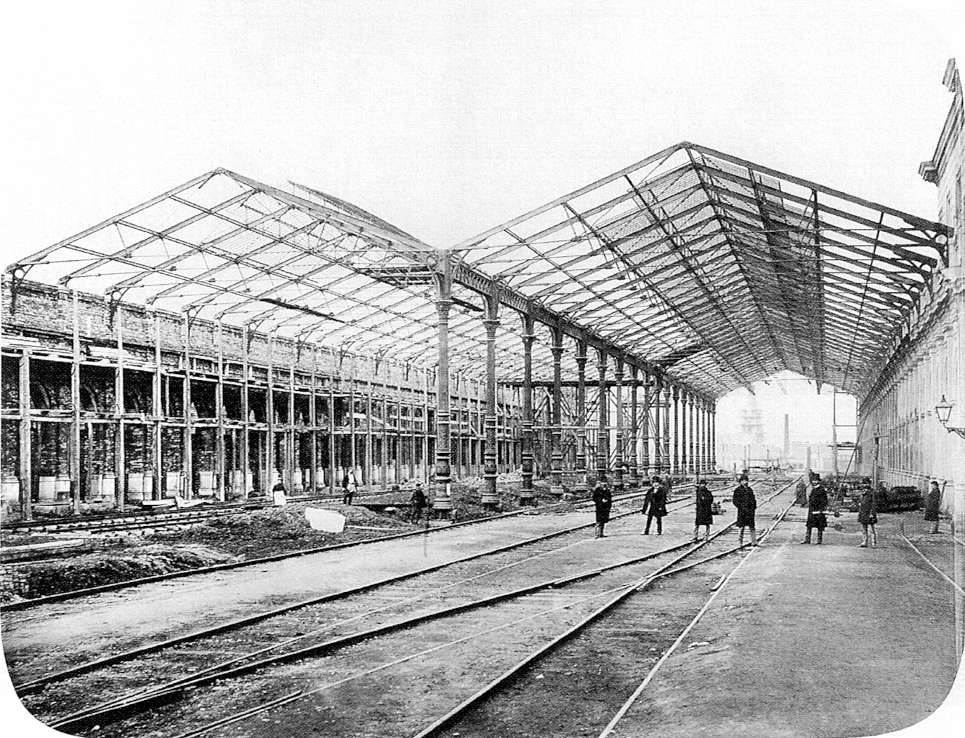 Baustelle der Abfahrtshalle des Staatsbahnhofes (später: Ostbahnhof) in Wien am 13. März 1870